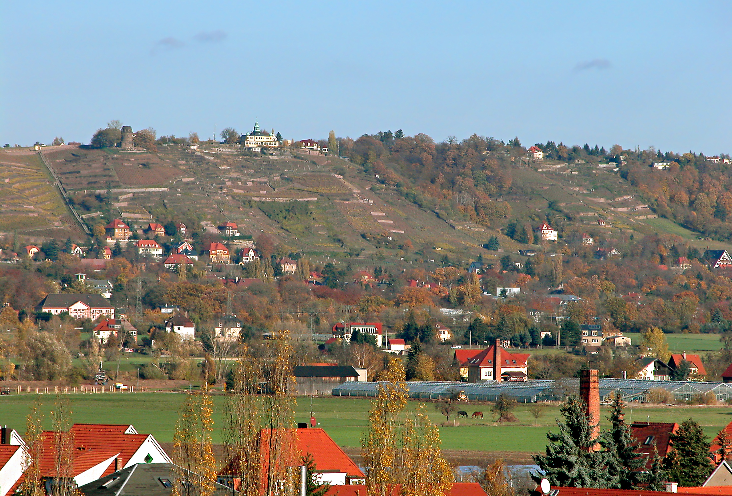 15.11.2006 01445 Radebeul: Blick von Cossebaude zu den Radebeuler Weinbergen. Links die Goldene Stiege, rechts daneben der Bismarckturm und weiter rechts das Spitzhaus. [DSCN12738.TIF]20061115195DR(c)Blobelt